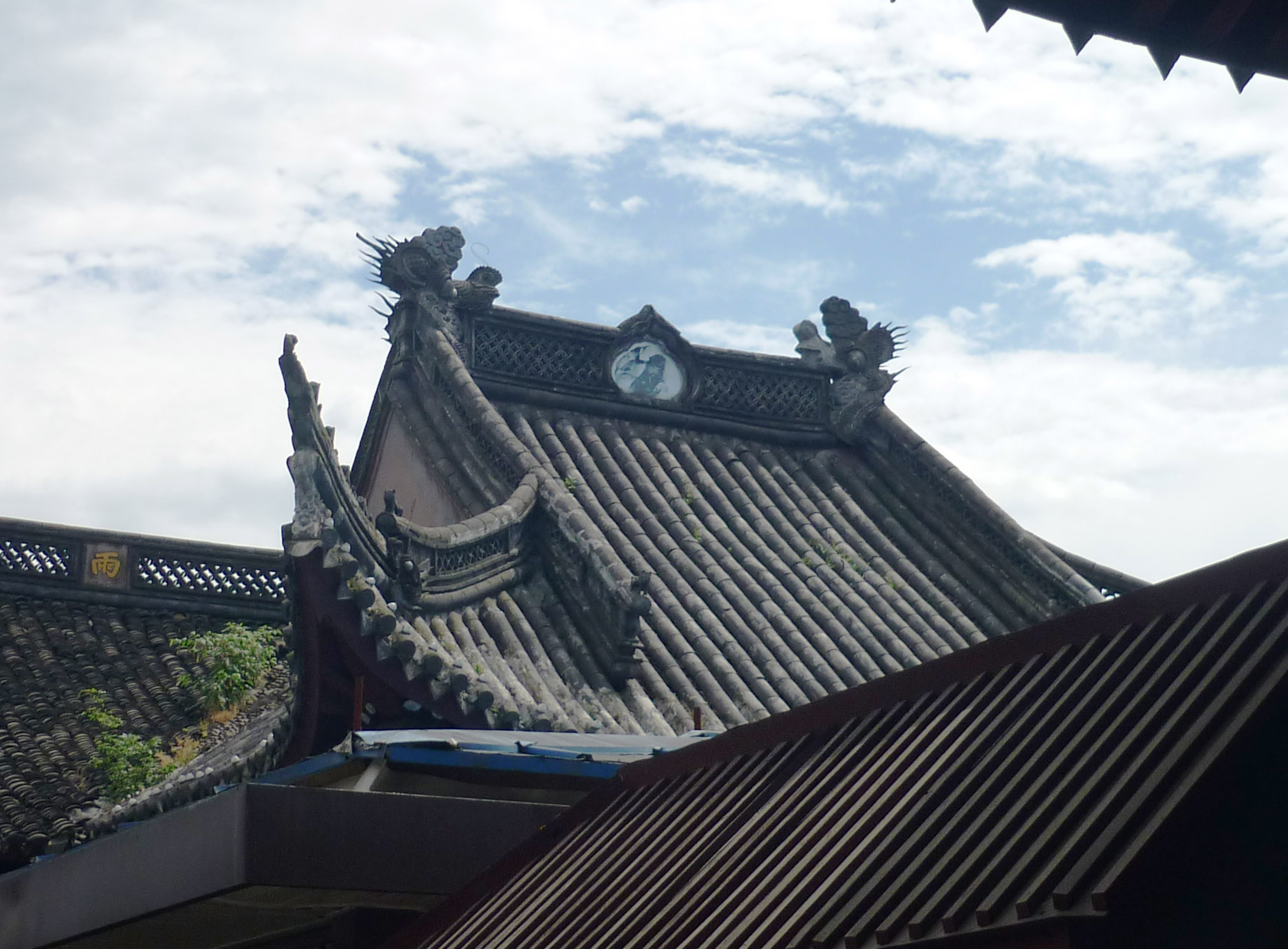 宁波府城隍庙戏台歇山顶